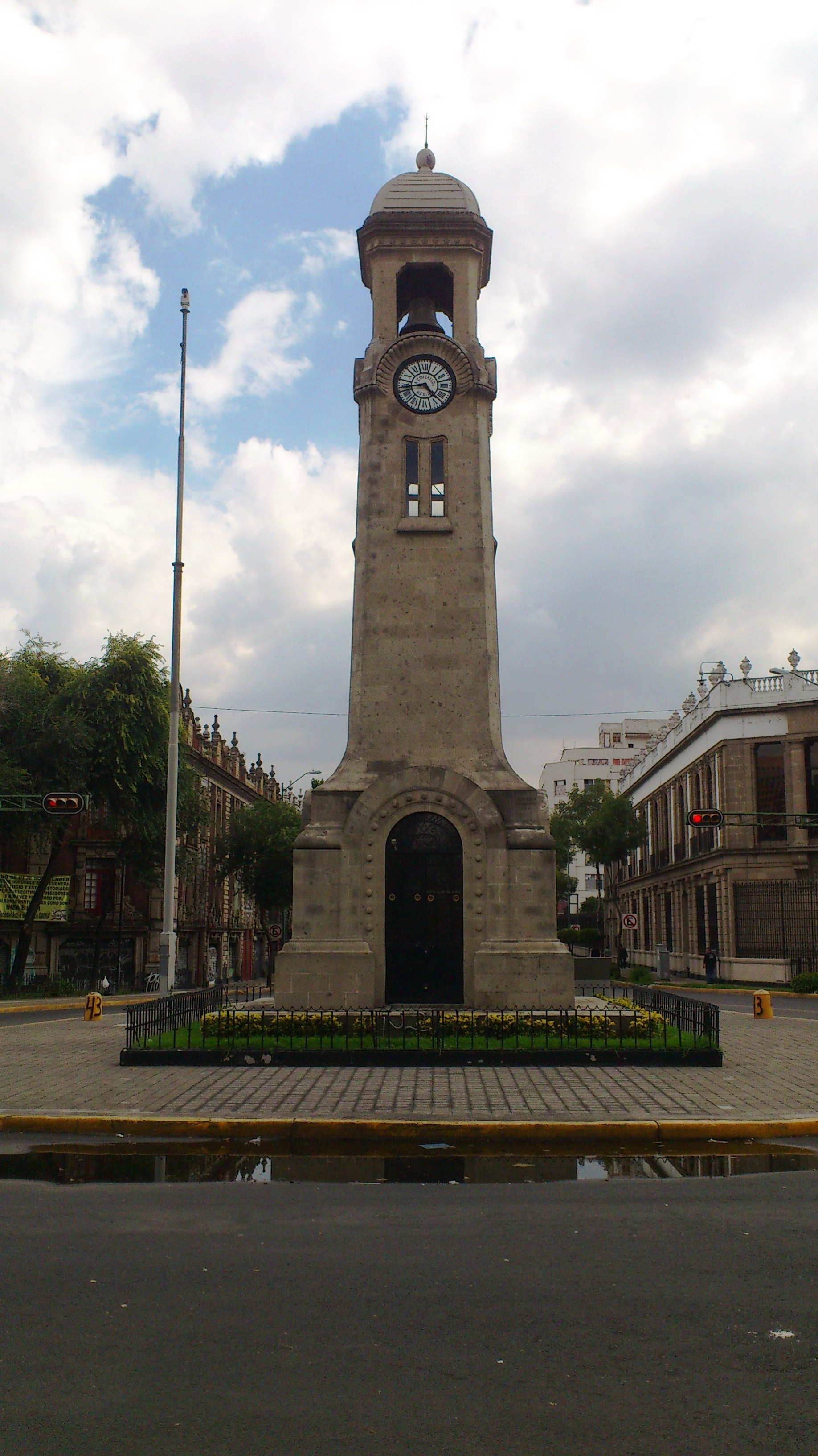 Reloj Chino de la calle Bucareli